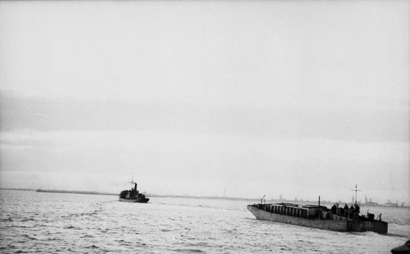 Information added by Wikimedia users.de: Vermutlich ein MFP Typ A. MFP der Nummern 38X waren nicht vor Mitte 1942 im Einsatz.